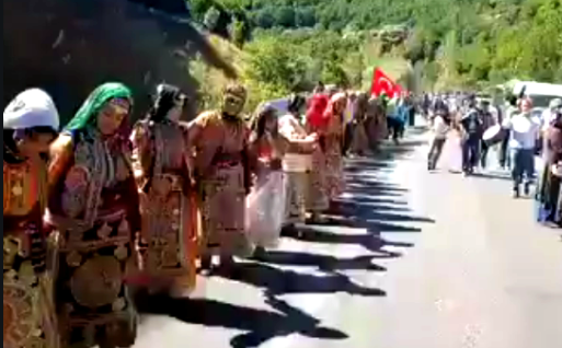 Gelin Kız Alma